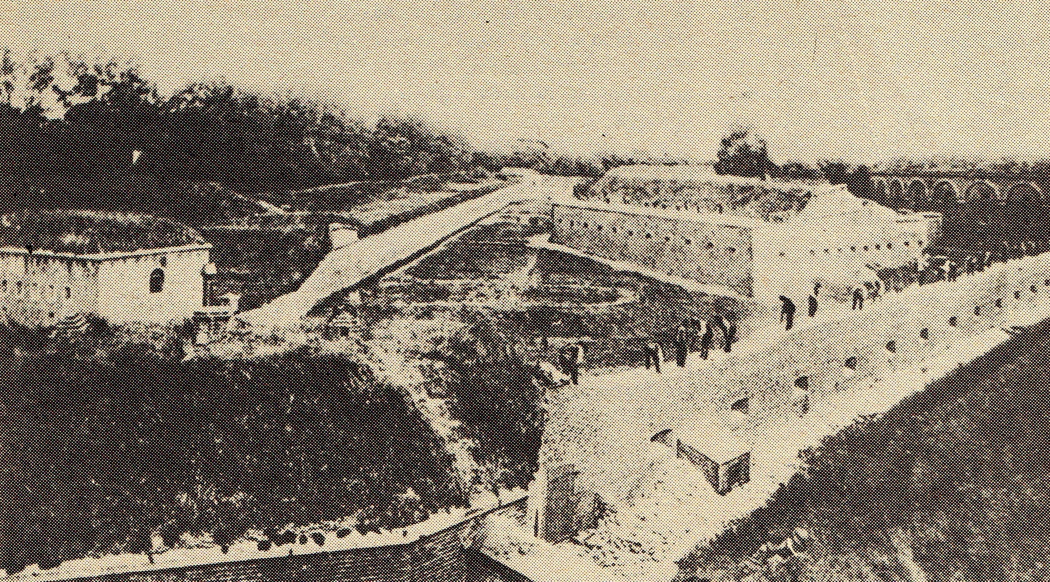 Rozbiórka bastionu Tietzen w Poznaniu w 1909r.